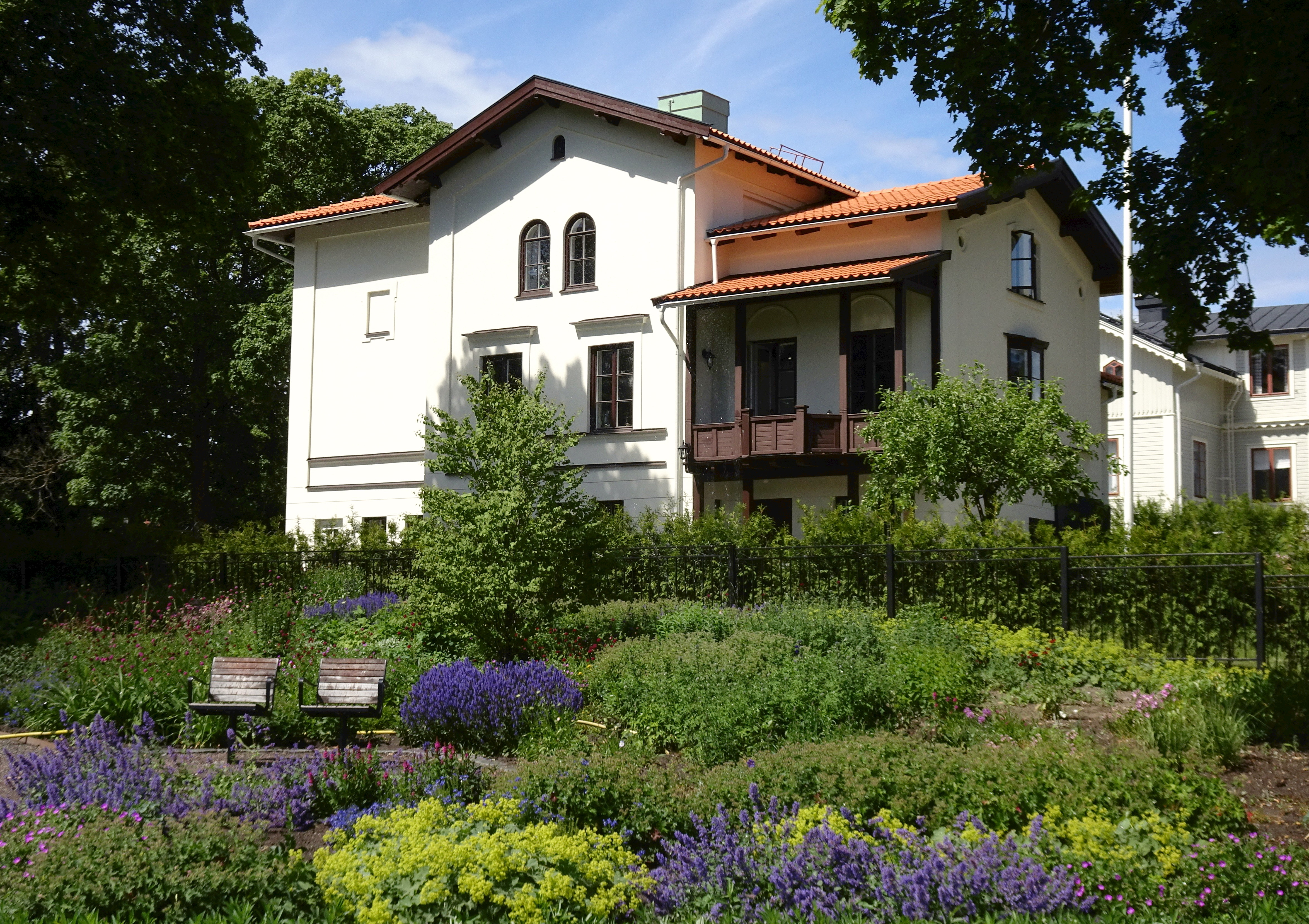 Vattumannen 2, Södertälje. Borgmästarvillan (även kallat Huset Ingenting), arkitekt Tore E:son Lindhberg